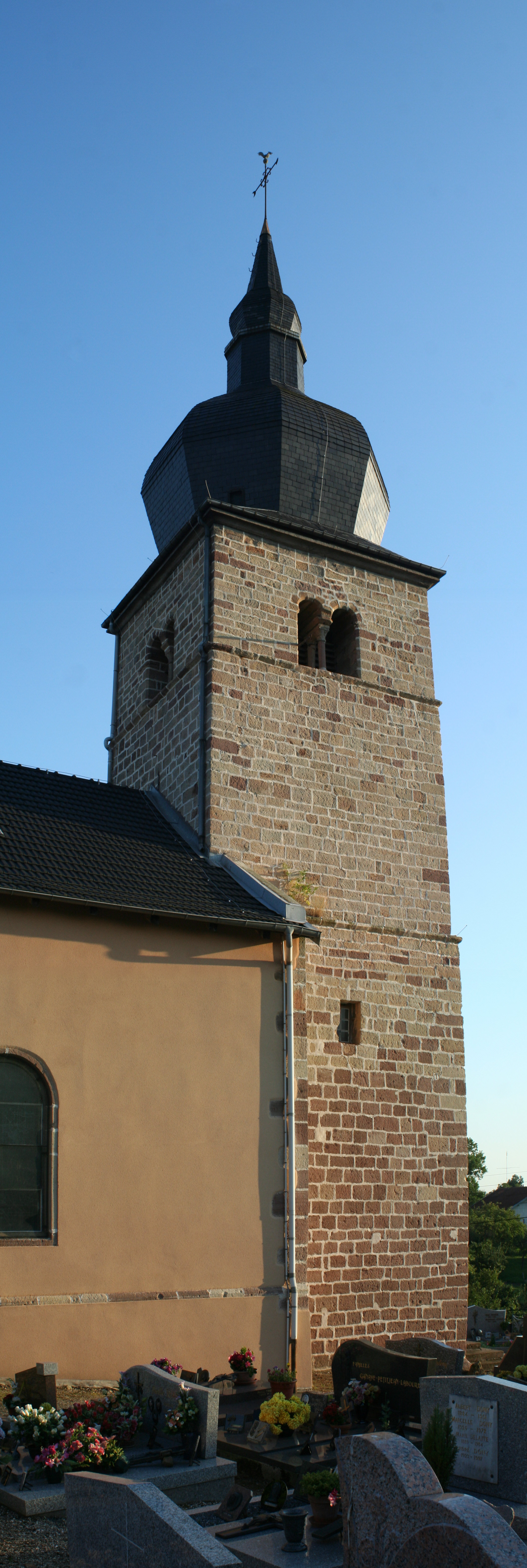 Clocher en grès rose de l'église d'Housseras (Vosges)